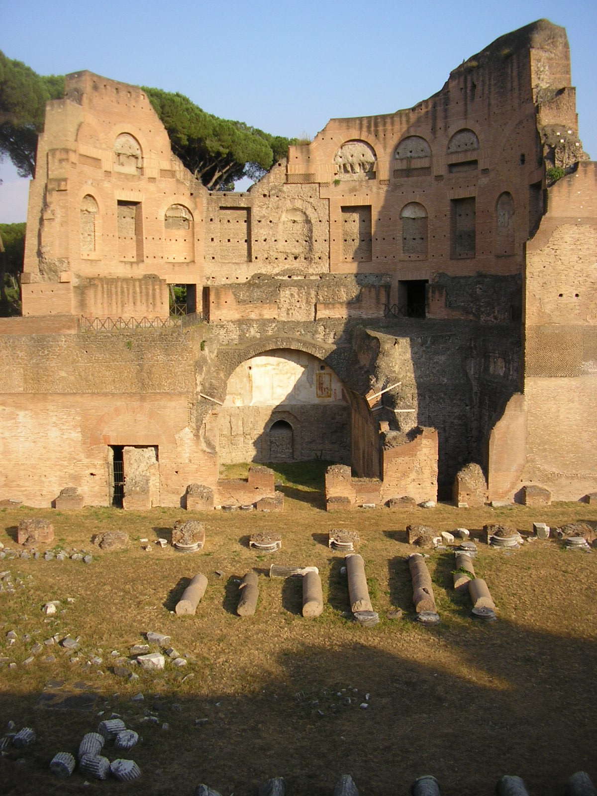 sa Stadion des Domitian